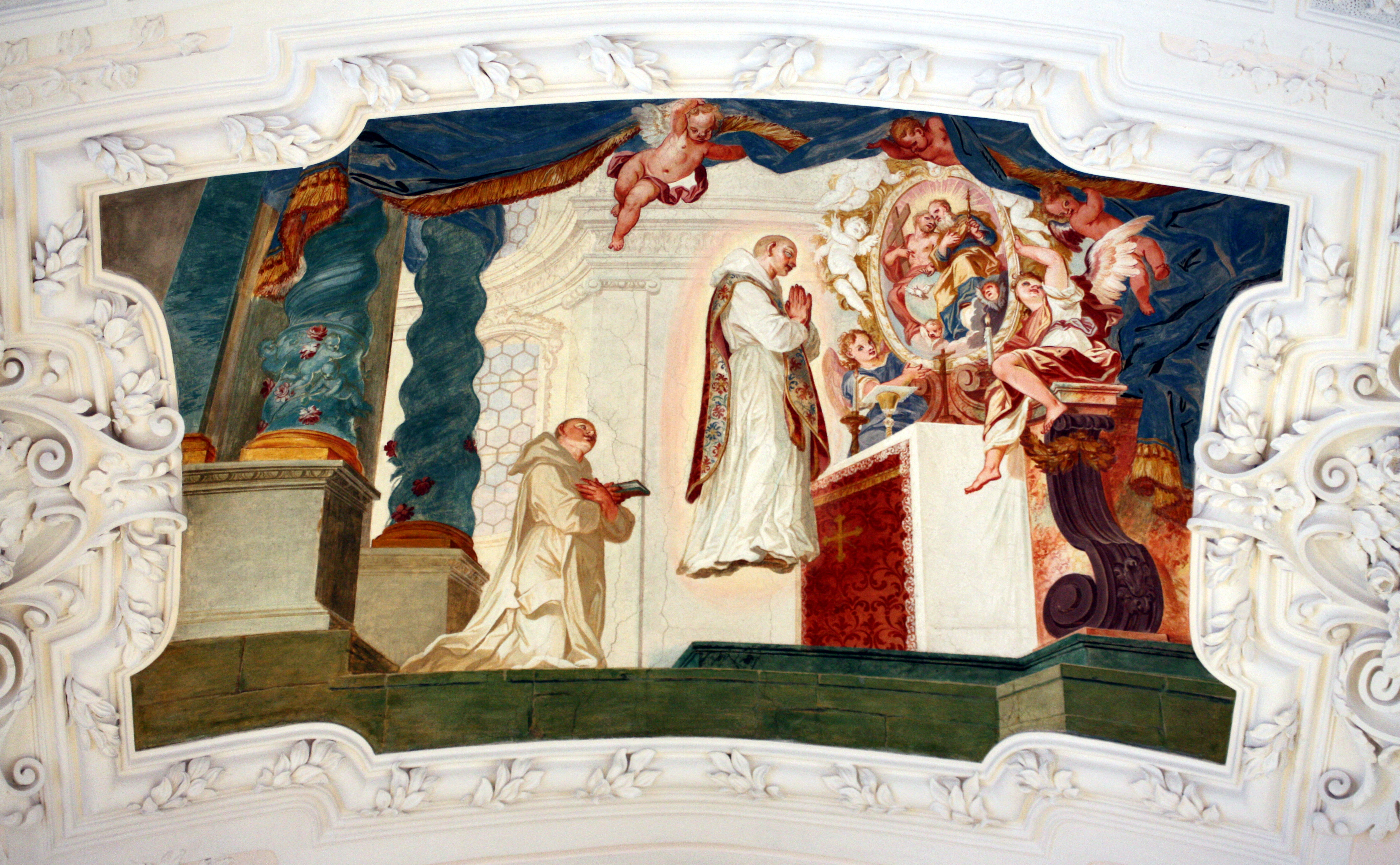 Fresko in der ehemaligen Klosterkirche der Kartause in Buxheim bei Memmingen - Google Maps - Google Earth